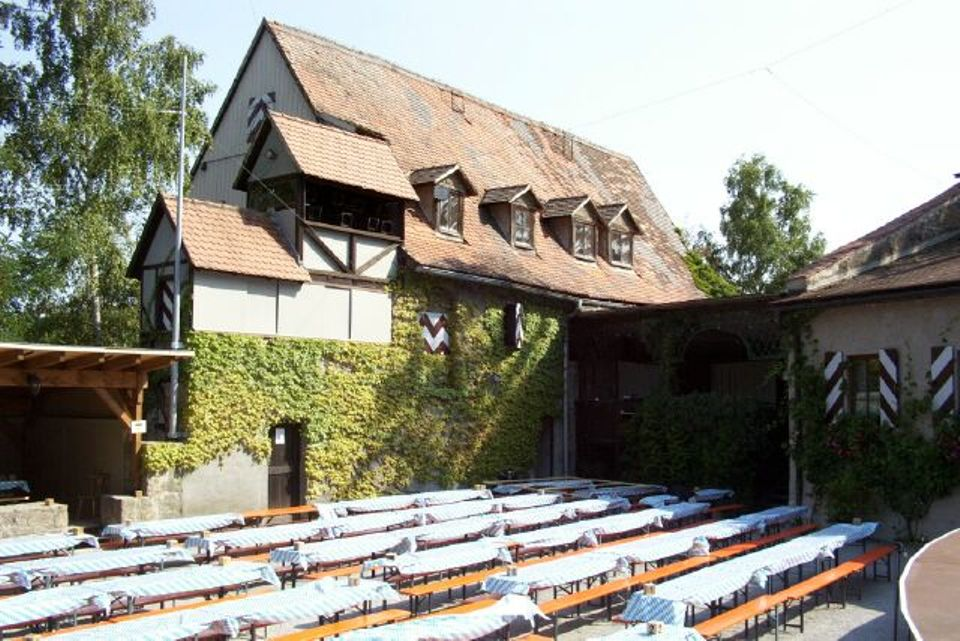 Zuschauerplätze im Hof der Burg Brattenstein